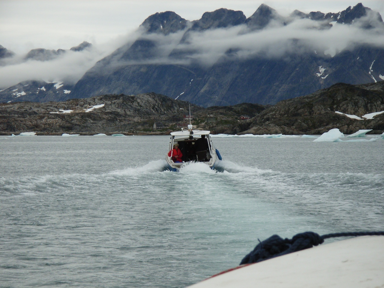 Quernertivartivit – Anfahrt zum Ort durch den Angmagssalik-Fjord